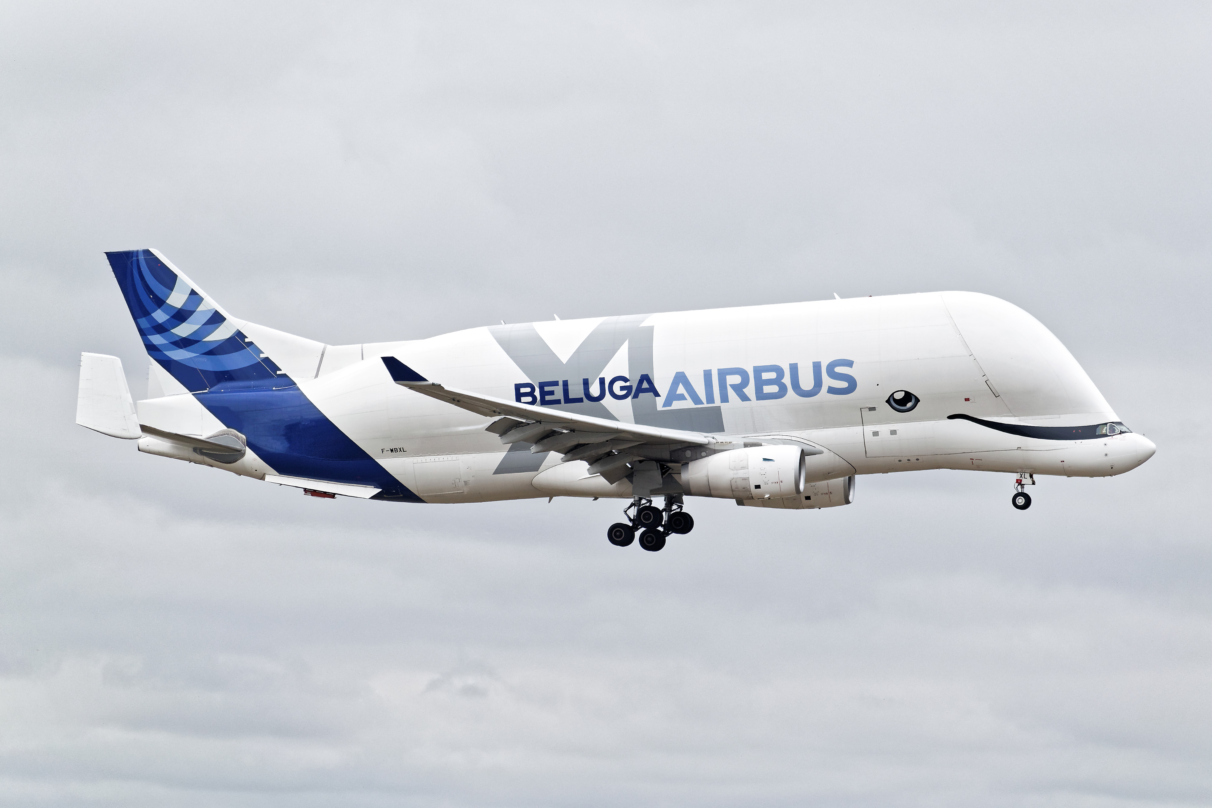 LFBO Airport Aéroport de Toulouse Blagnac